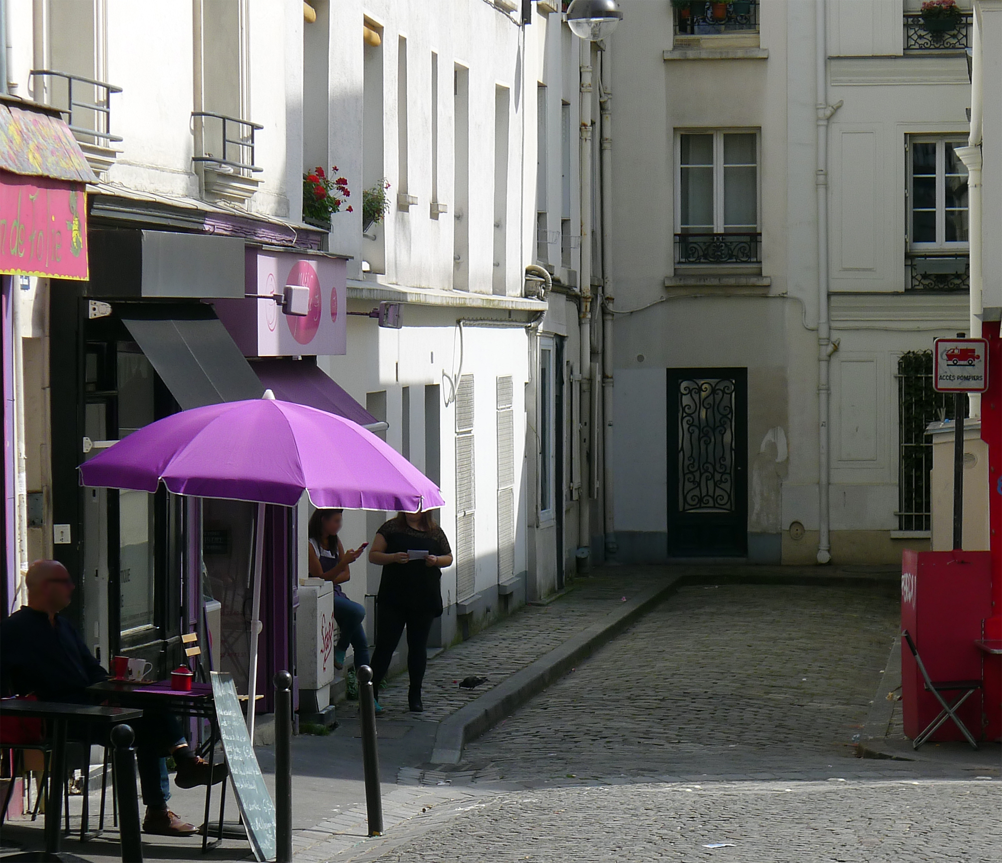 Cité de la Mairie - Paris XVIII